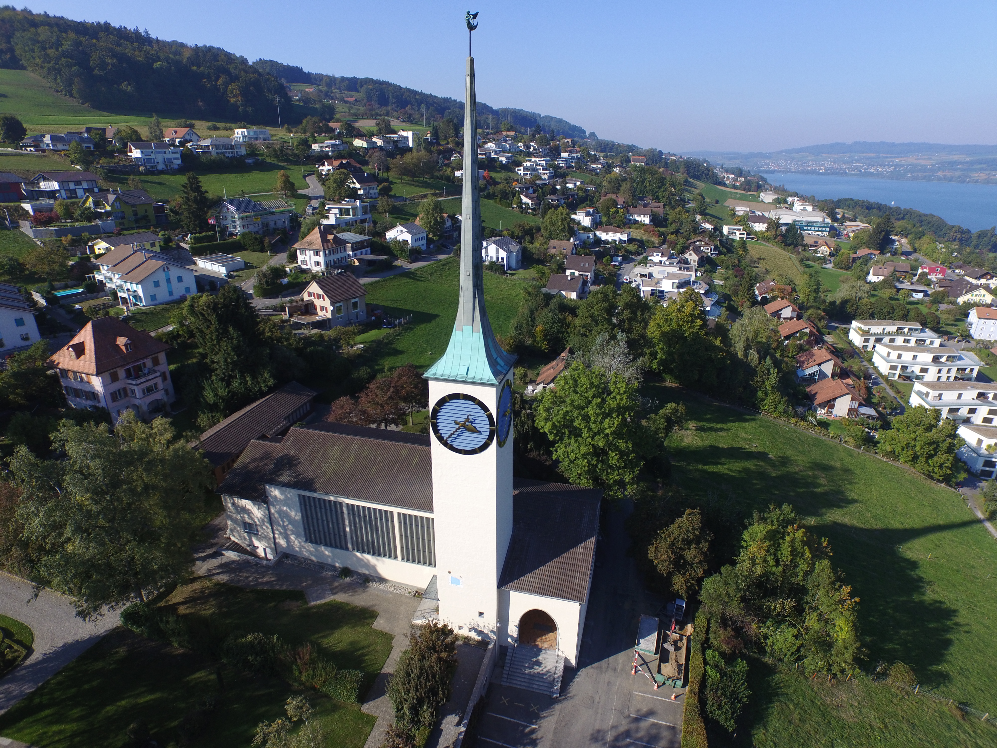 Reformierte Kirche Beinwil am See